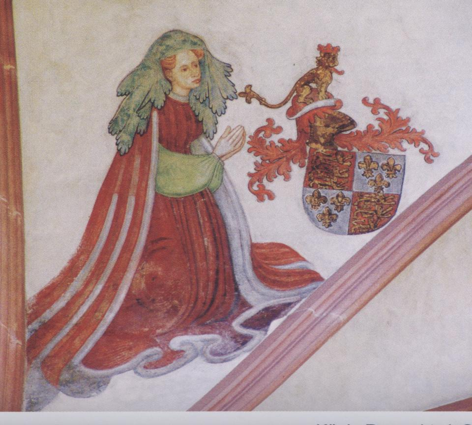 Blanka von England, durch Heirat Pfalzgräfin in der Kurpfalz